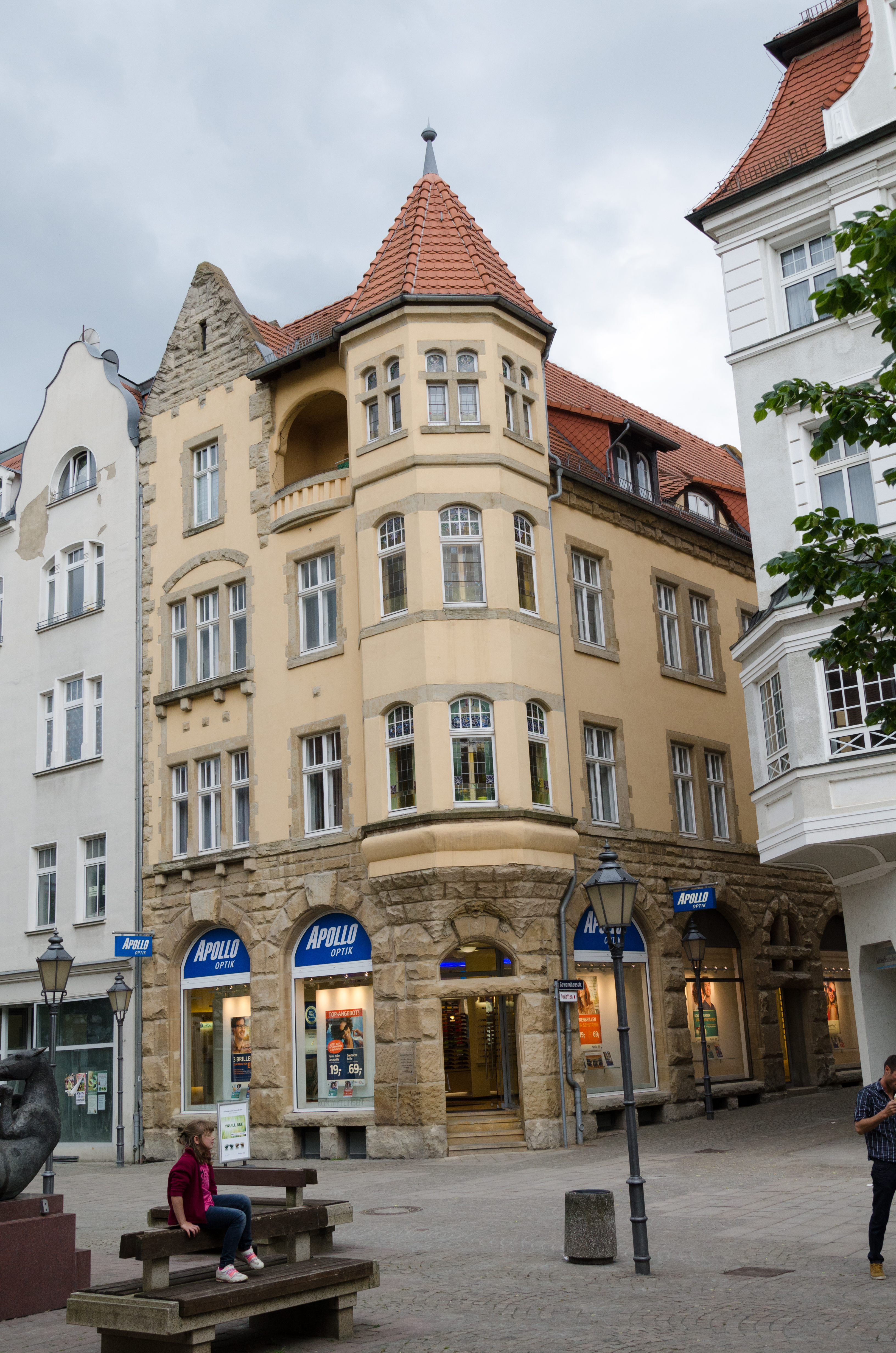 Zeitz, Roßmarkt 5